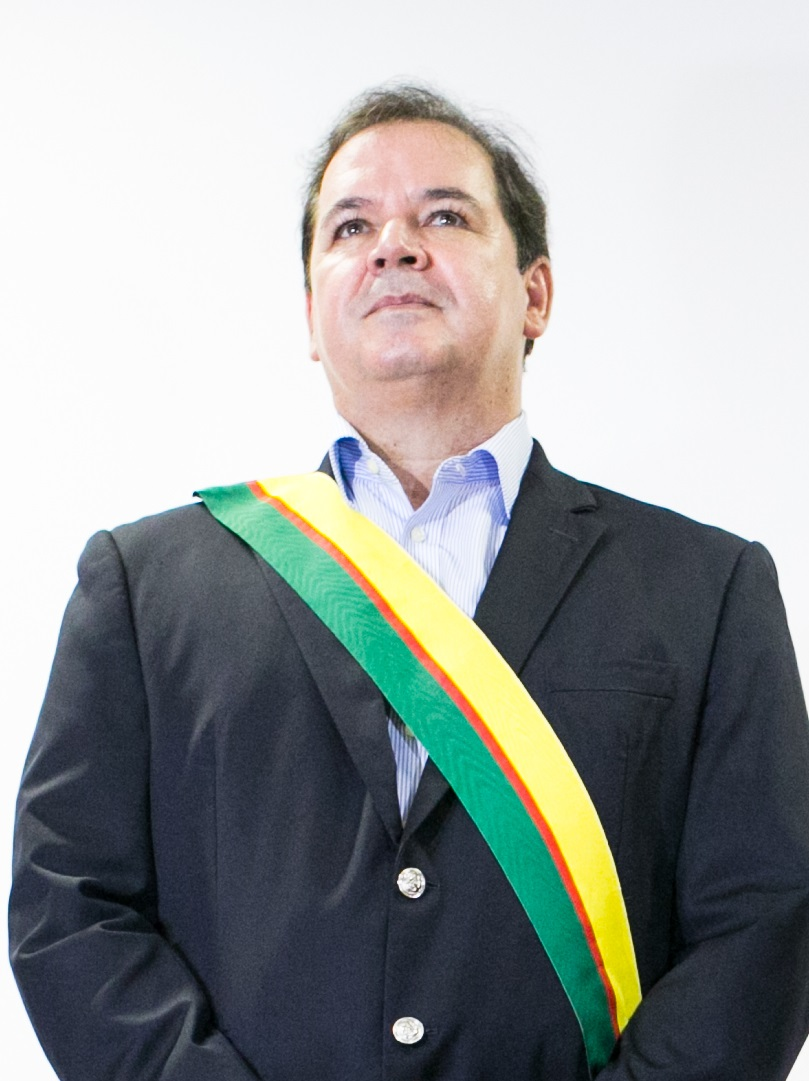 MinC Ministro Juca encontra-se com classe artí-stica e recebe a Gran Cruz da Ordem da Estrela do Acre do governador Tião Viana. Foto:LiadePaula RIO BRANCO-AC 12/11/2015